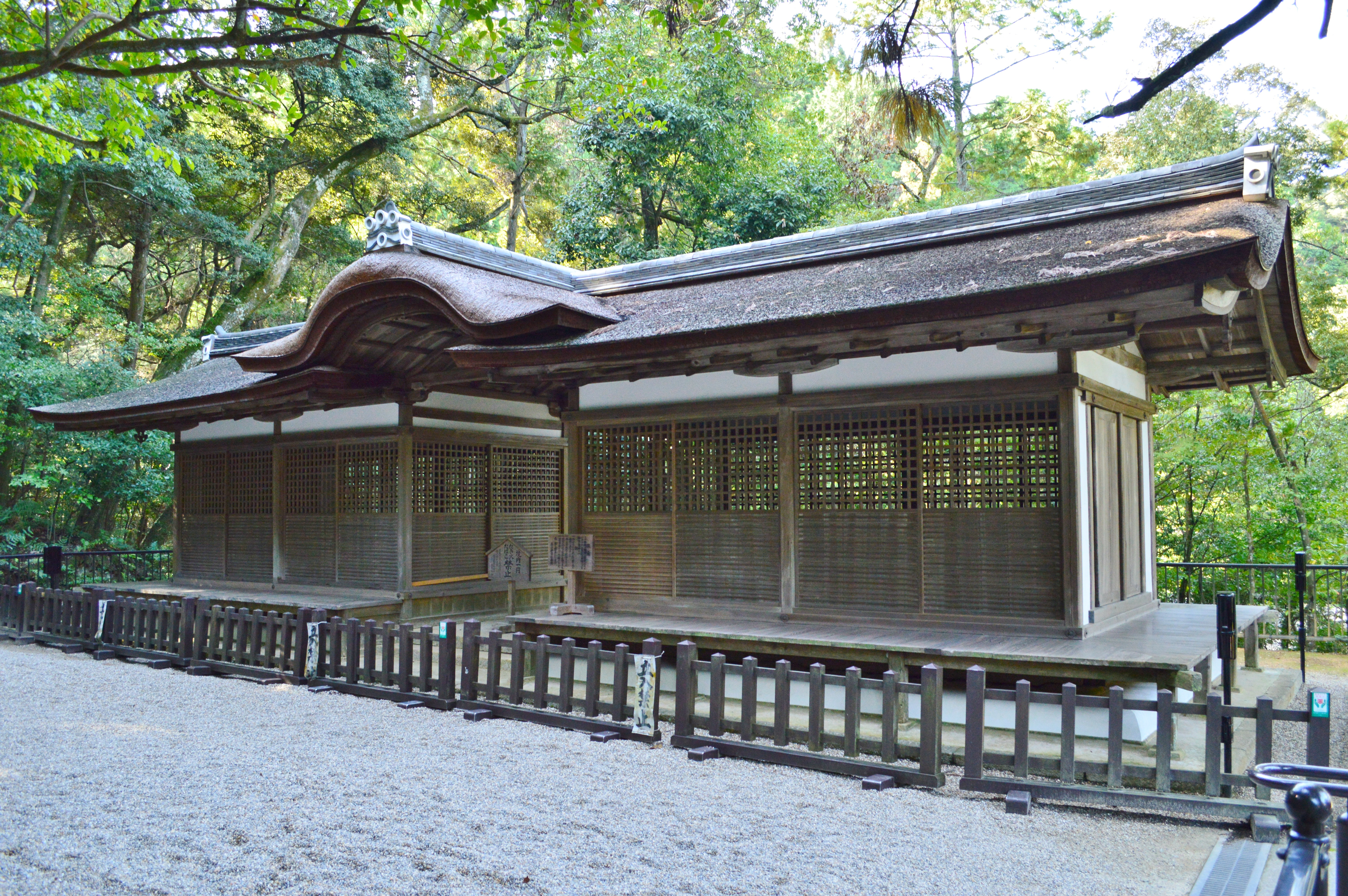 石上神宮摂社 出雲建雄神社 拝殿